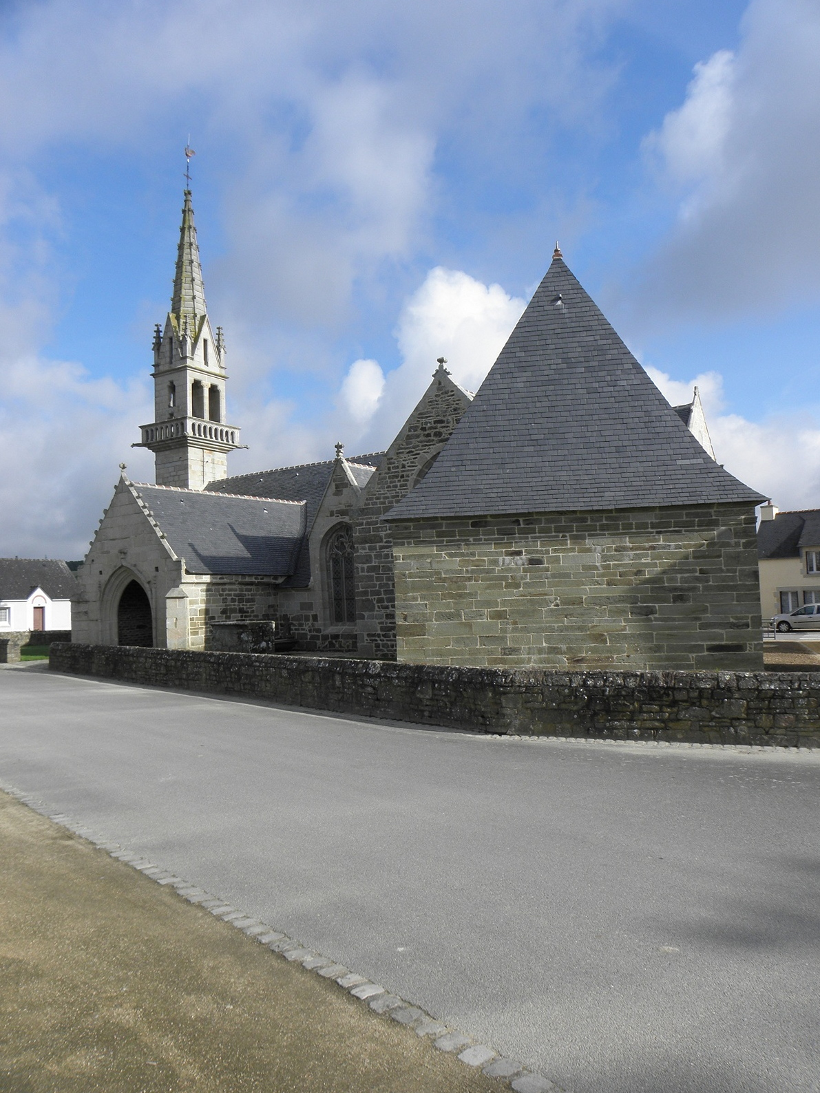 Sacristie et flanc sud de l'église Saint-Trémeur de Kergloff (29).